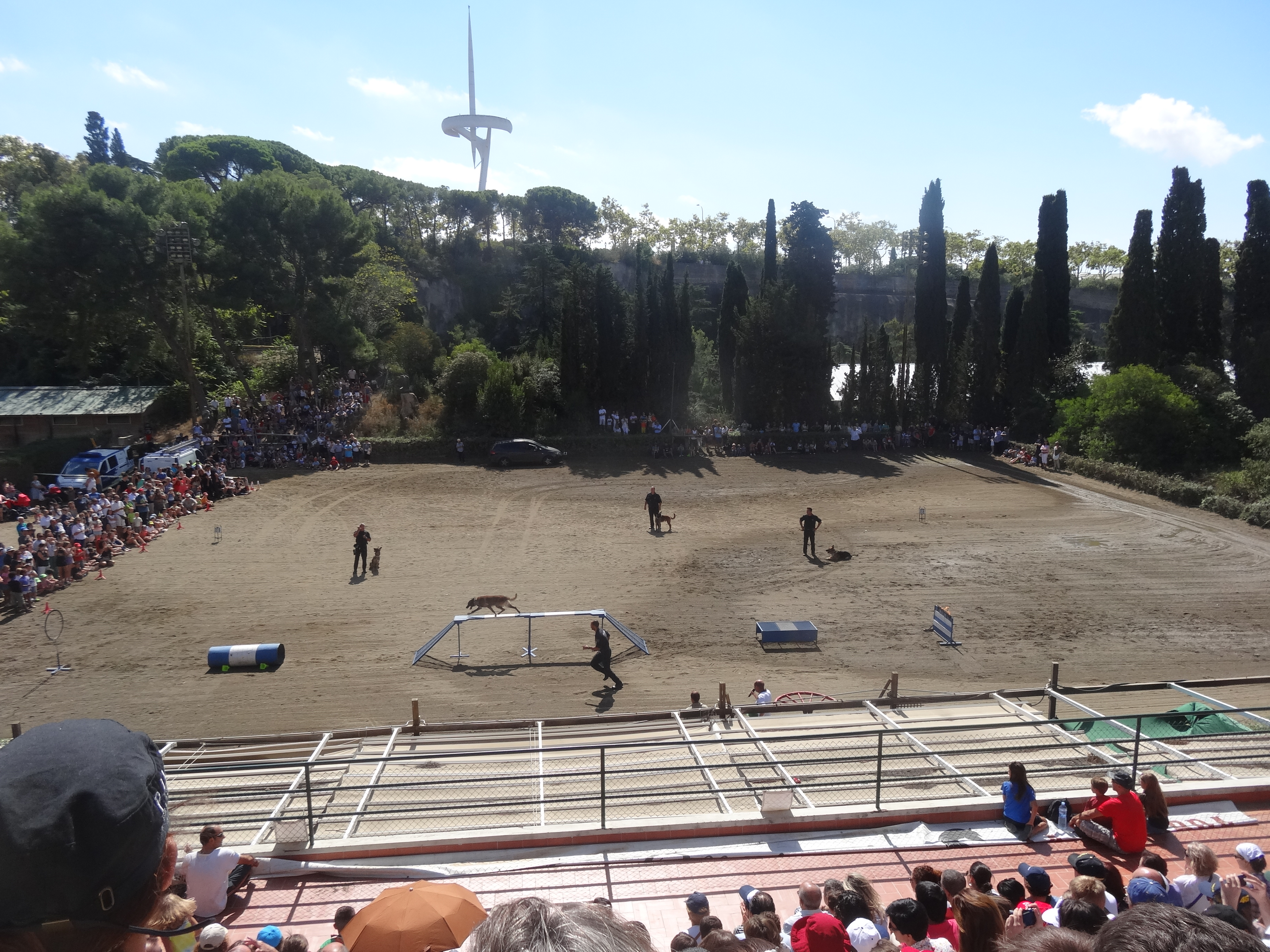 La Mercè 2013 - Hípica La Foixarda - Exhibició de la unitat canina de la Guardia Urbana